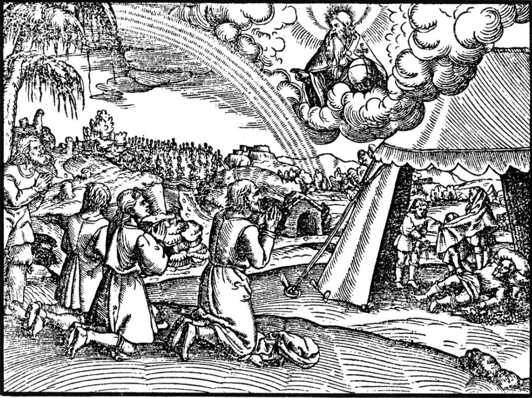 Bibel-Illustration: Gottes Segen über Noah und seine Söhne; der Regenbogen als Zeichen des Bundes (Gen. 9,1 ff. und 13)